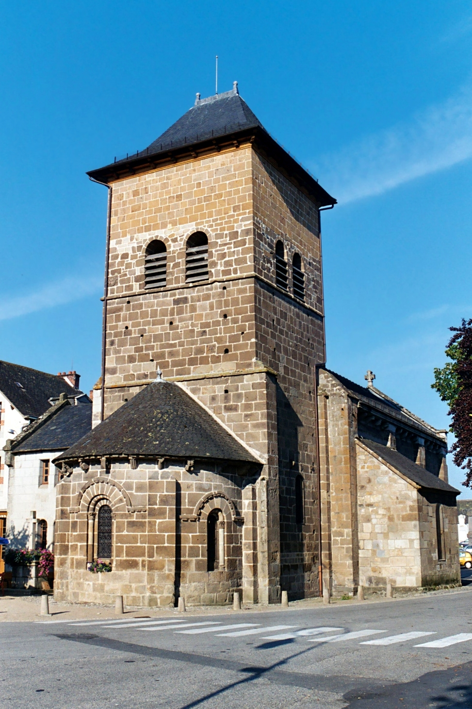 France - Auvergne - Cantal - Église Sainte-Croix de Saignes